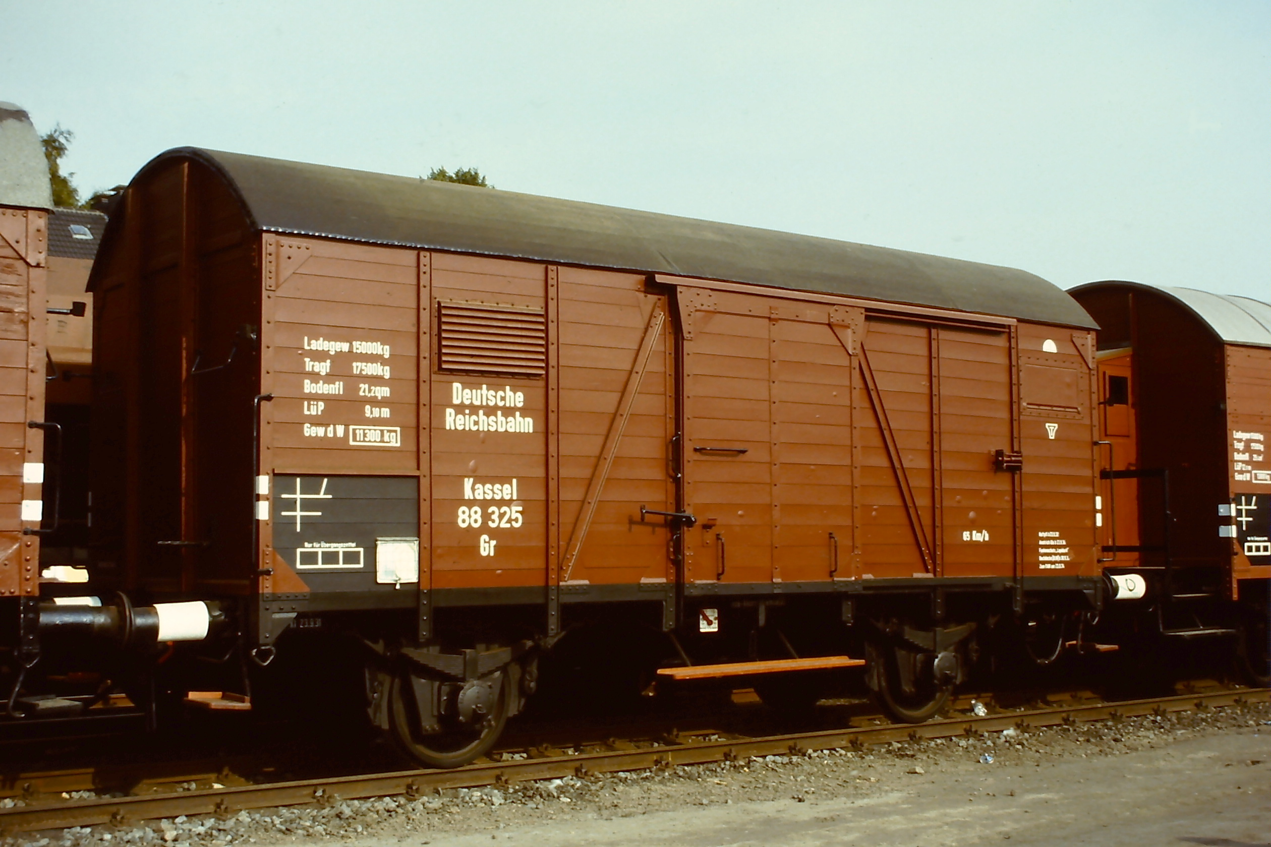 DRG Kassel Gr, ausgestellt auf der Fahrzeugschau 150 Jahre deutsche Eisenbahn in Bochum-Dahlhausen